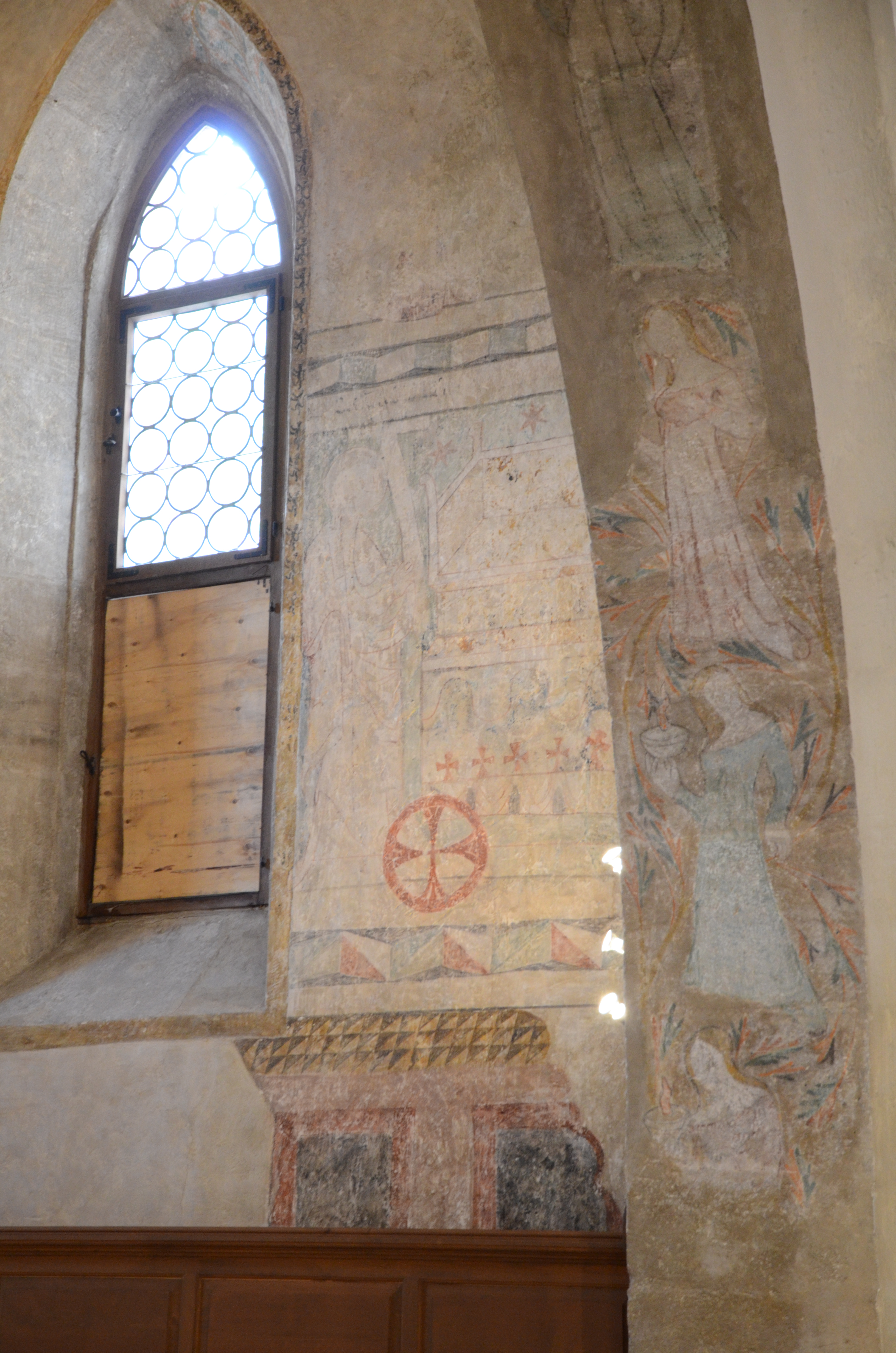 Dinkelsbühl, Spitalkirche, Fresken